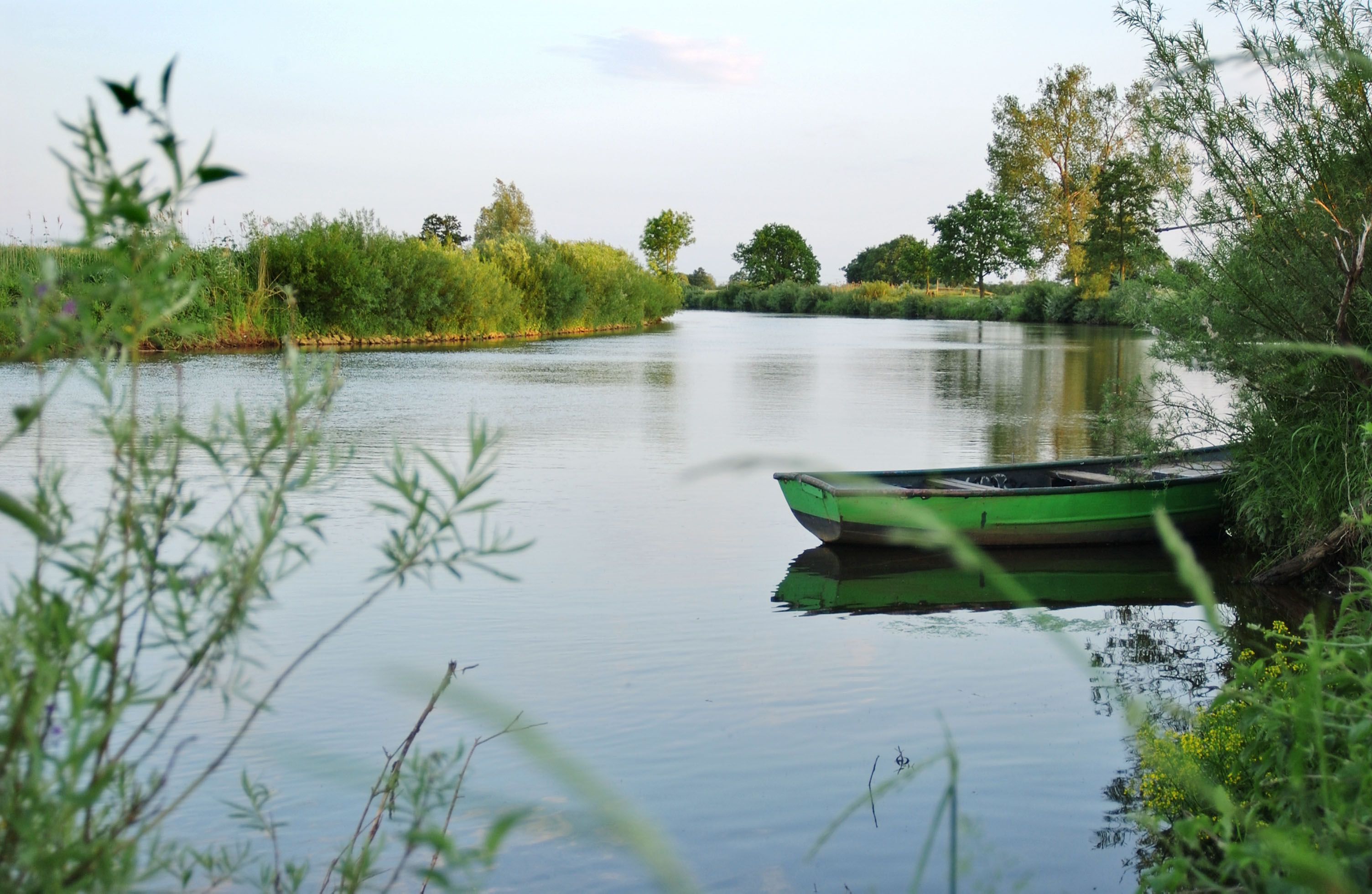 Boot am Emsufer